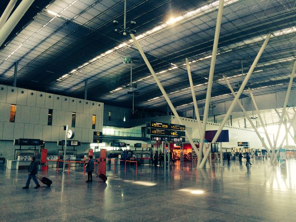 Interior del vestíbulo de facturación de la terminal de pasajeros del aeropuerto de Santiago de Compostela